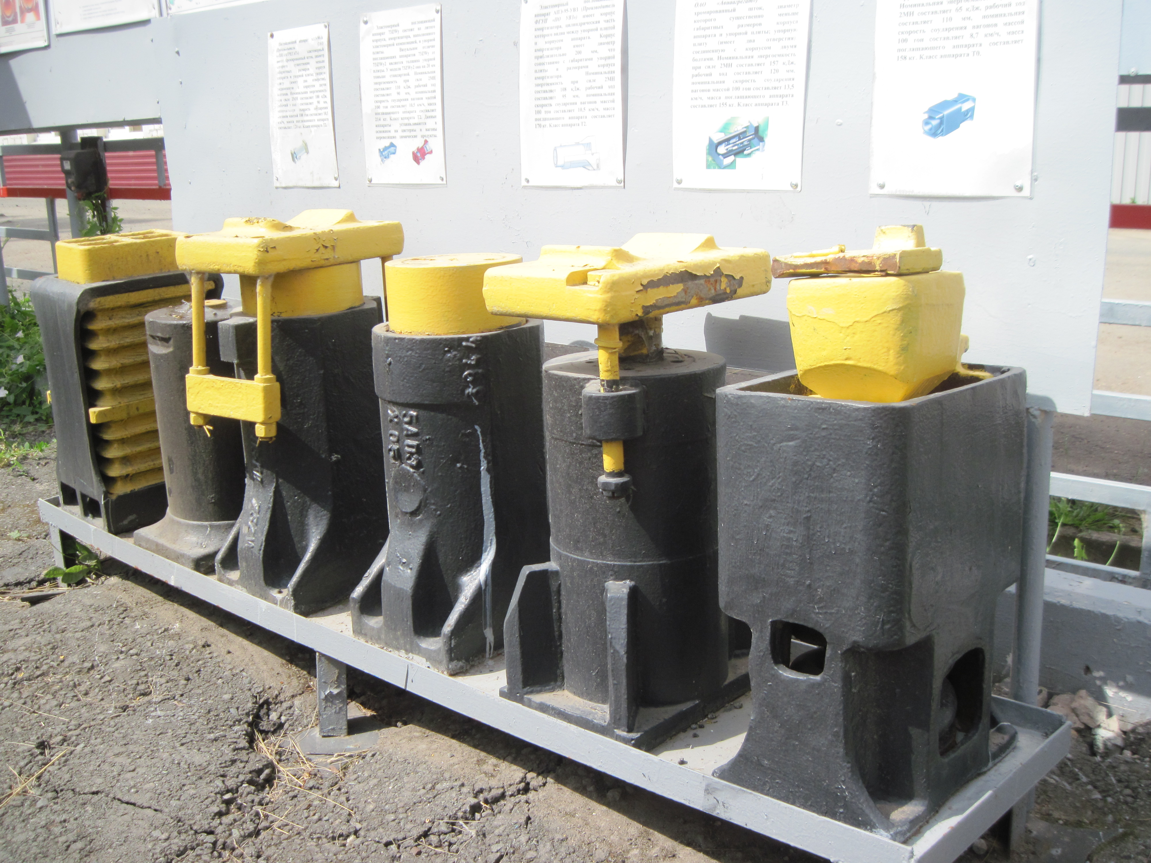 Различные модификации,разных производителей,от Т0 до Т3 класса.